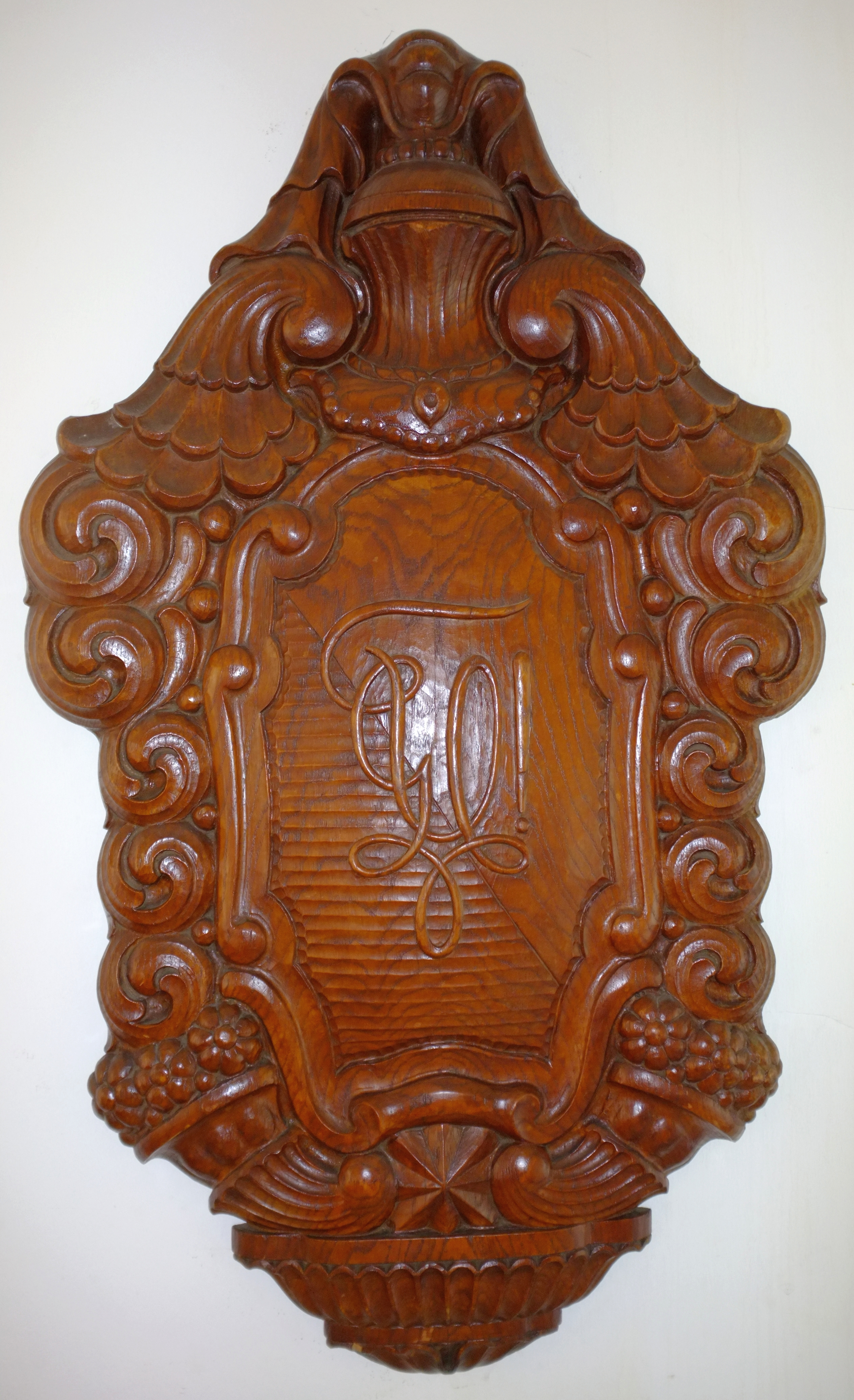 Holztafel mit dem Zirkel der Turnerschaft Utonia Zürich